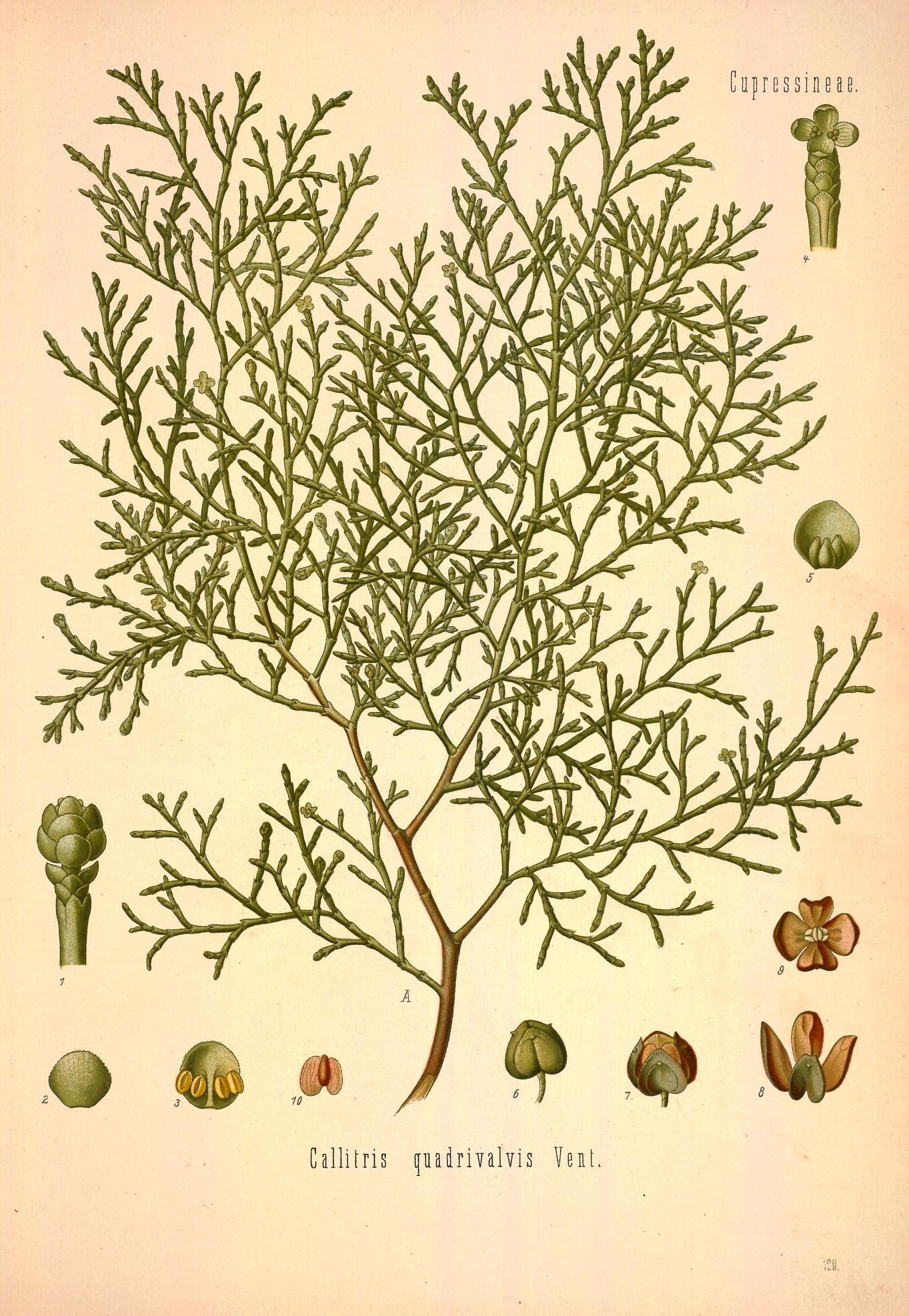 Sandarakbaum. A Zweig in natürl. Grösse; 1 männliche Blüthe, vergrössert; 2, 3 Staubblätter von verschiedenen Seiten, desgl.; 4 weibliche Blüthe, desgl.; 5 Fruchtblatt mit 3 Samenknospen, desgl.; 6 Fruchtzapfen, geschlossen, desgl.; 7 derselbe geöffnet, desgl.; 8, 9 vollständig geöffneter Zapfen von oben und von der Seite, desgl.; 10 Same, desgl.